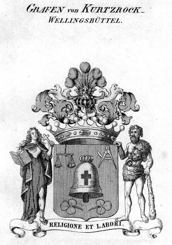 Wappen der Grafen von Kurtzrock-Wellingsbüttel (erbländisch-österreichischer Grafenstand 1819)